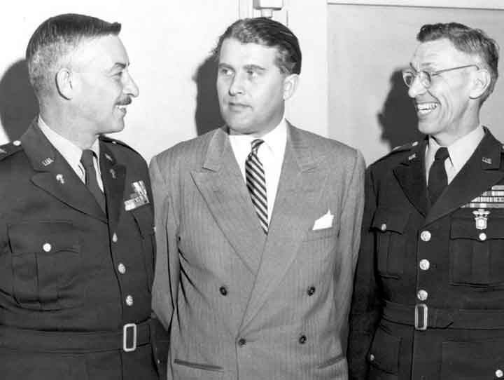 Army Major Genaral John B. Medaris (left), Wernher von Braun (mid) and Brigadier Genaral Holger N. Toftoy (right).